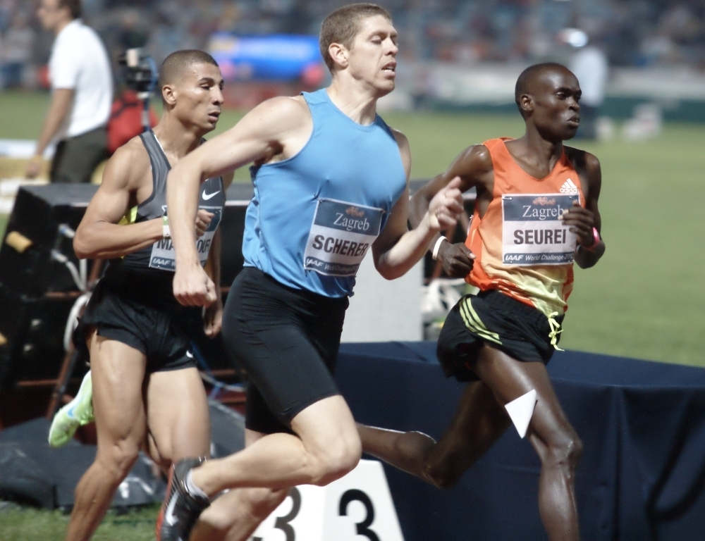 Utrka na 1500m na 62. Hanžeku u Zagrebu 2012. godine, naprijed su "zečevi" Matthew Scherer (SAD) i Benson Seurei (Kenija), zadnji u grupi je pobjednik Taoufik Makhloufi (Alžir)